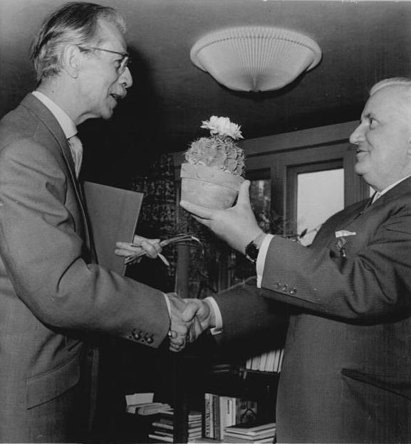 60. Geburtstag Willi Bredel, Gratulation Otto Nagel Zentralbild Eckleben AV 3563 2.5.1961 2.5.1961 Glückwünsche zum 60. Geburtstag von Willi Bredel Vertreter der Kassenorganisationen, Schriftsteller und Künstler überbrachen am 2. Mai dem Schriftsteller Nationalpreosträger Willi Bredel Glückwünsche zu seinem 60. Geburtstag. UBz: Der Präsident der Deutschen Akademie der Künste, Prof. Otto Nagel, überbringt Willi Bredel die Glückwünsche der Akademie. Abgebildete Personen: Nagel, Otto Prof.: Maler, Präsident der Akademie der Künste (AdK), Nationalpreisträger, Vaterländischer Verdienstorden (VVO) in Gold, DDR (PND 118586300) Information added by Wikimedia users. Abgebildete Personen: Bredel, Willi: deutscher Schriftsteller und Präsident der Deutschen Akademie der Künste. Er gehörte zu den Pionieren der sozialistisch-realistischen Literatur. (PND 118514776)